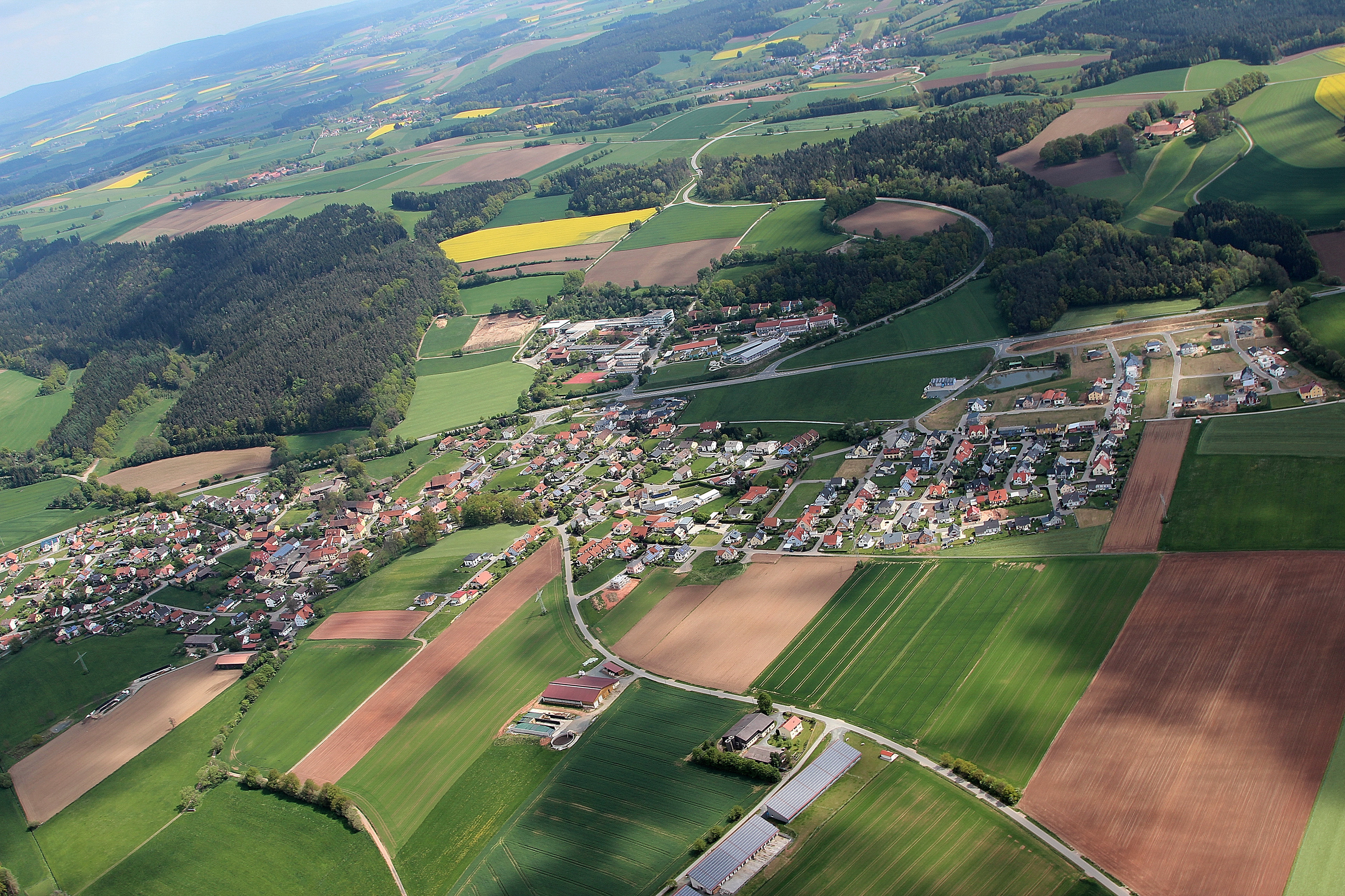 Irchenrieth, am oberen Bildrand Kaimling, Landkreis Neustadt an der Waldnaab, Oberpfalz, Bayern